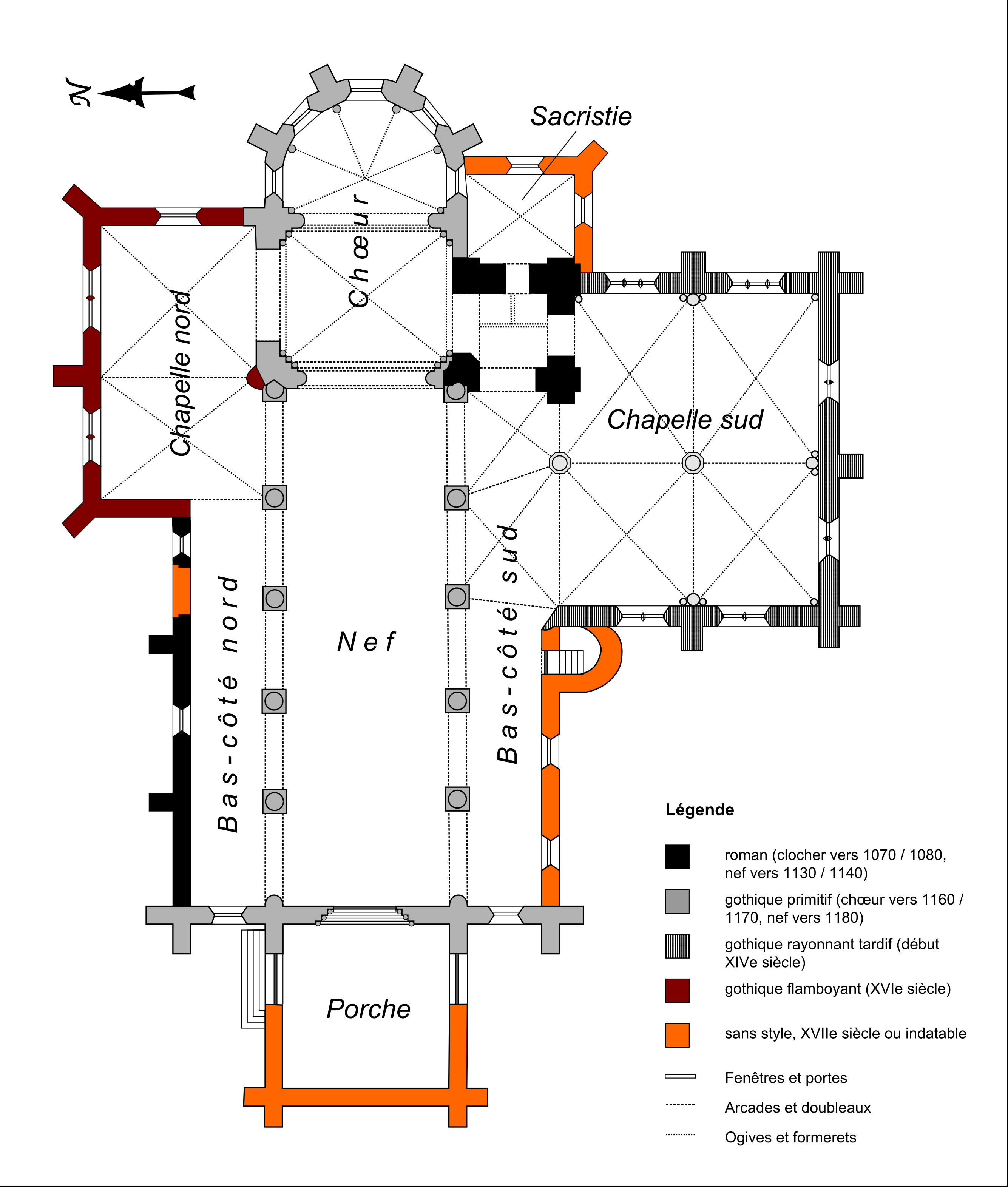 Plan des masses schématique de l'église Saint-Gervais.